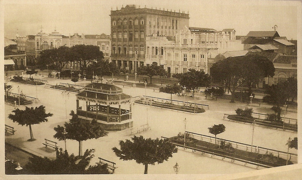 Praça do Ferreia com Coreto na década de 1920 e vista do Cine Majestic.